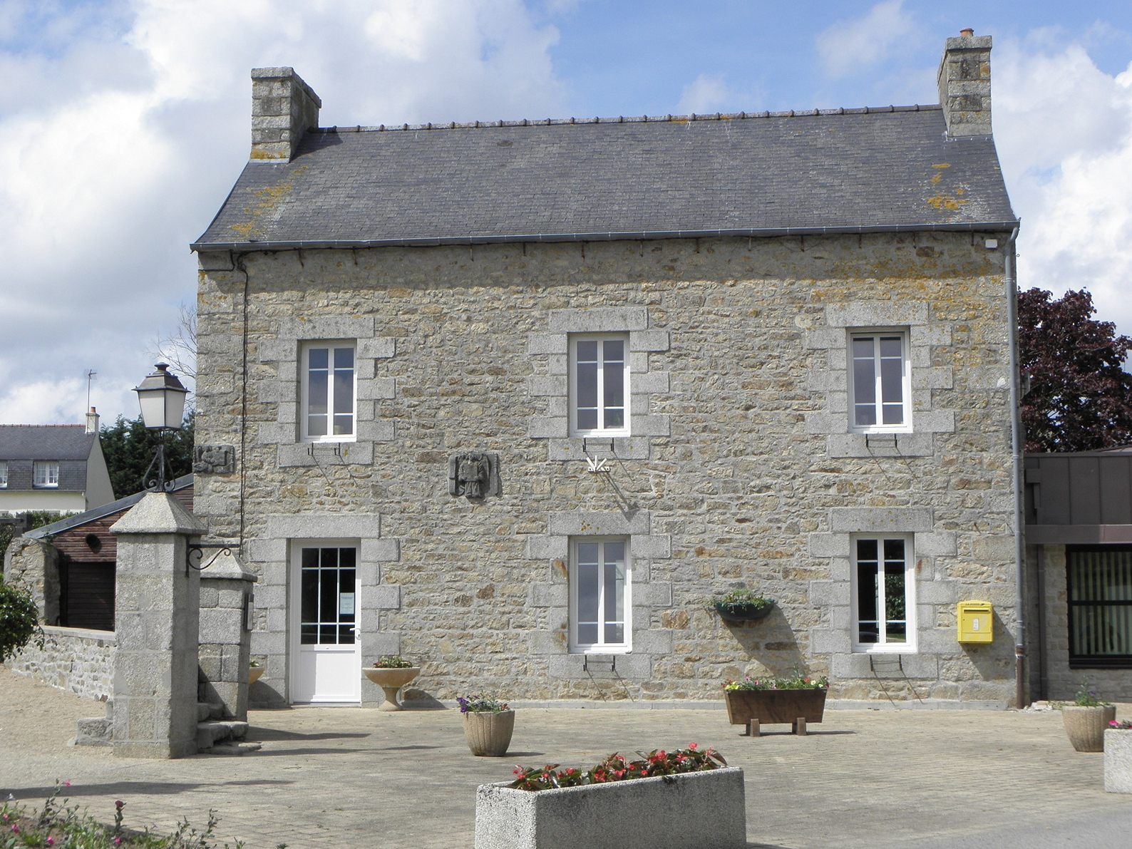 Mairie de Tréflaouénan (29).